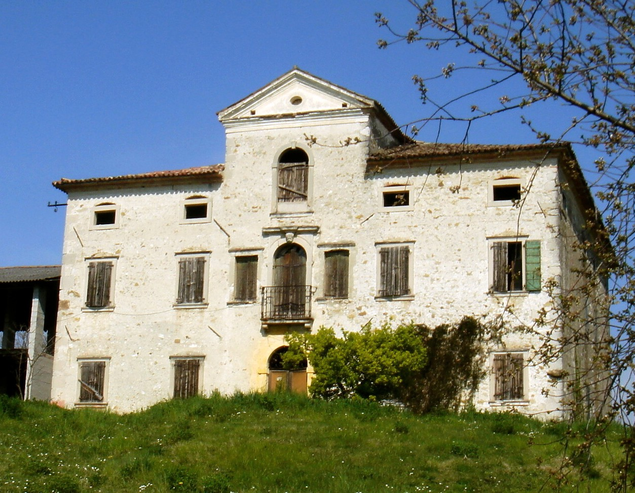 Ogliano di Conegliano (Treviso): Casa Canonica (XVIII sec.).